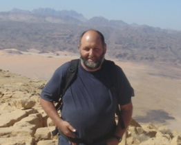 timi west sinai